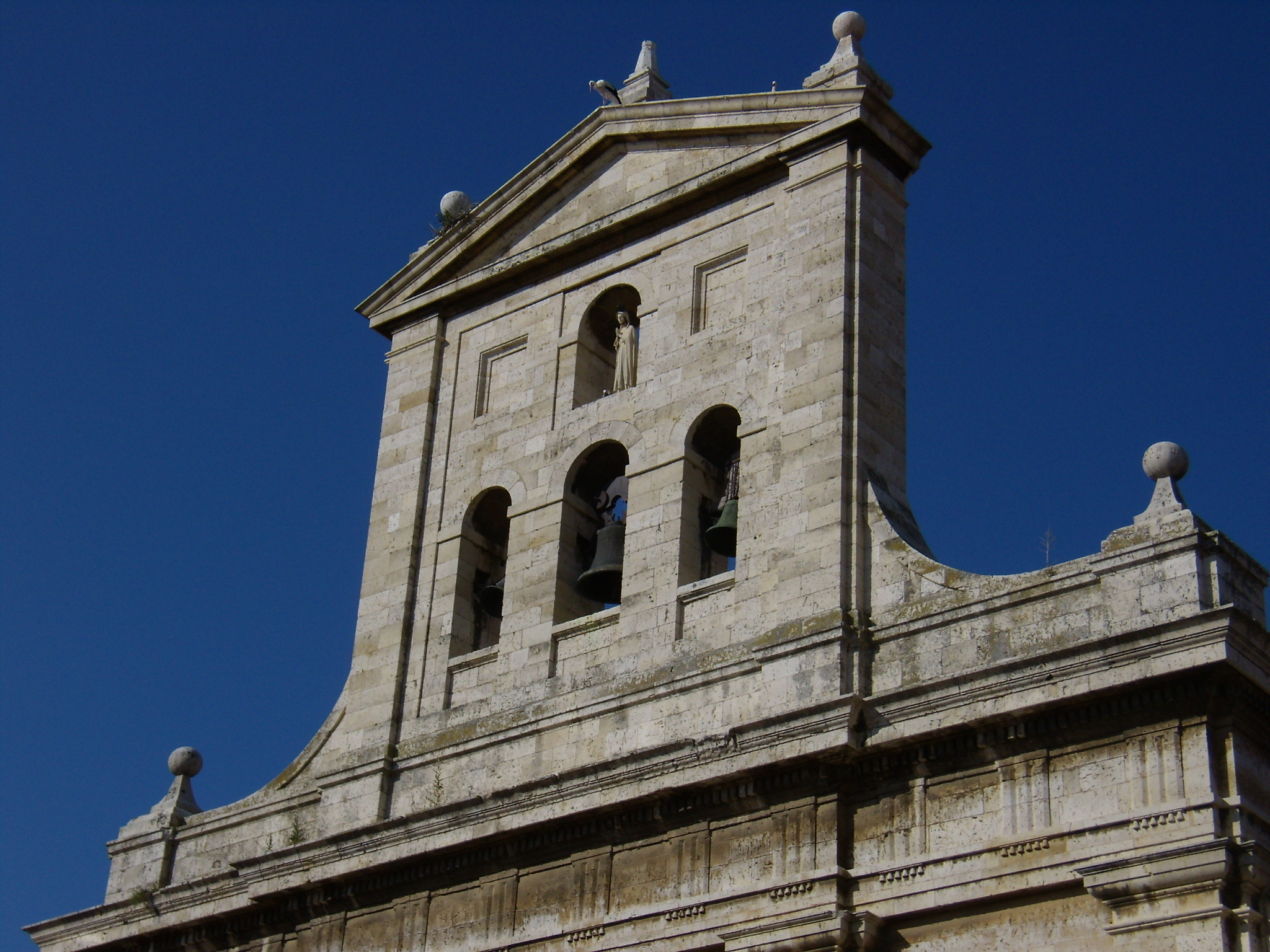 Espadaña de la fachada principal de la iglesia de San Pablo (Palencia)